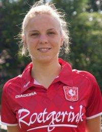 Lorca VDP